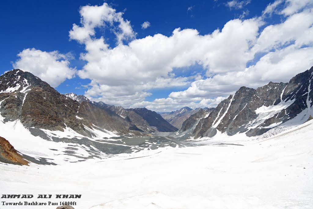 Bashkaro Pass 16000ft